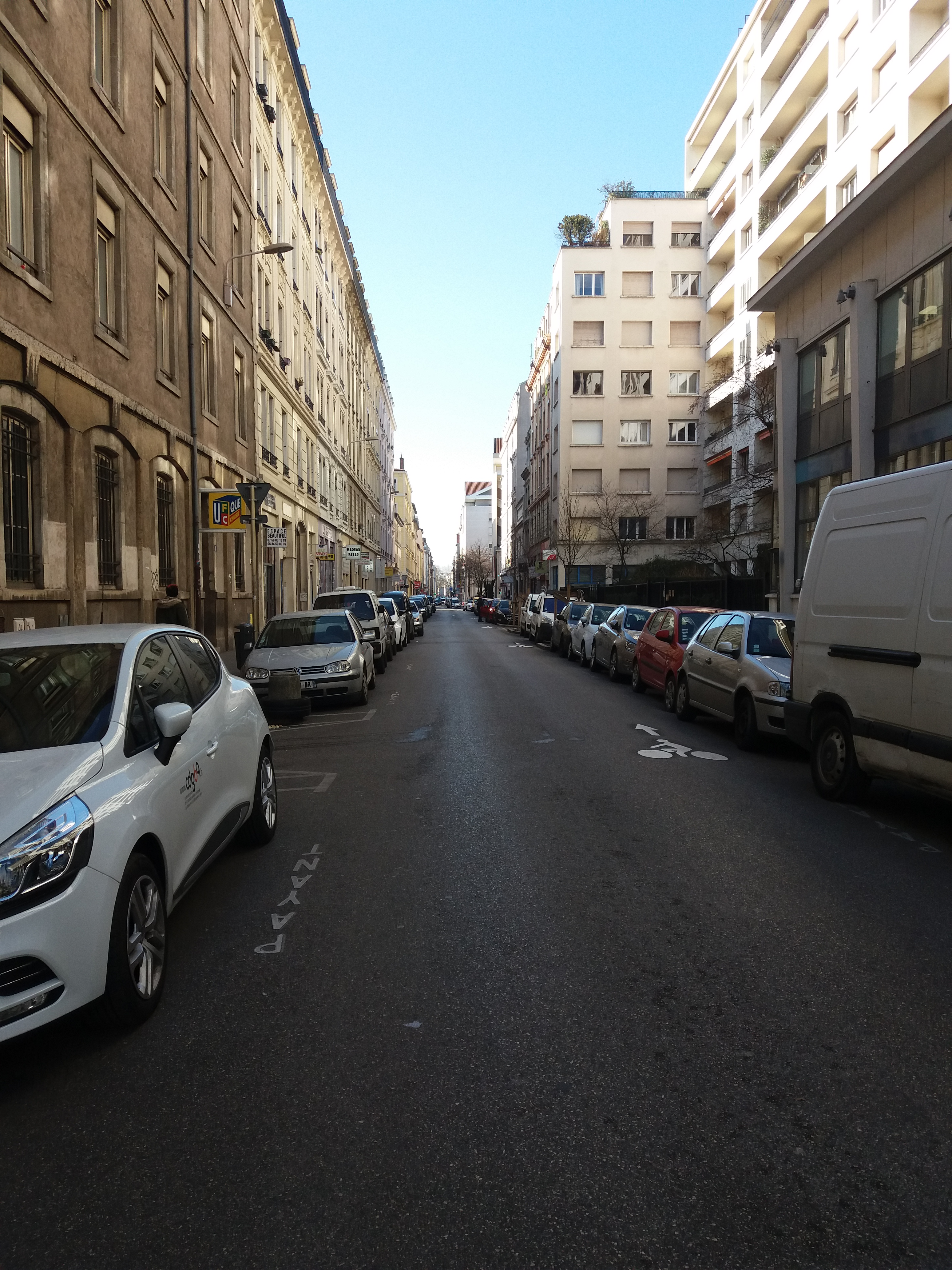 Depuis le cours Gambetta.